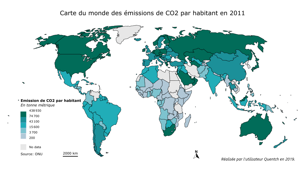 Discrétisation de l'émission de CO2 en tonne métrique en quantile. Les pays en gris n'ont pas de données.